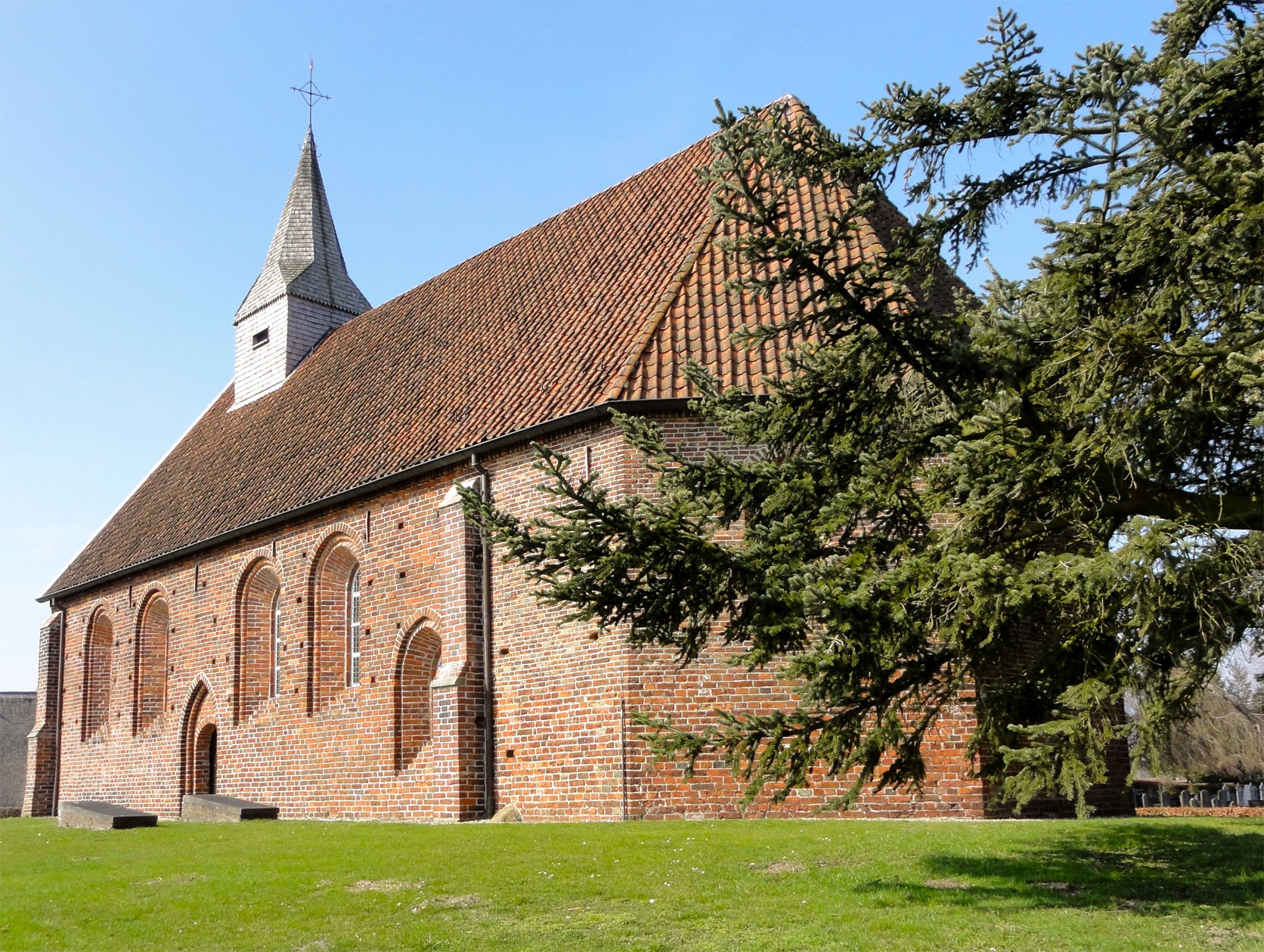 Kerk van Zweeloo